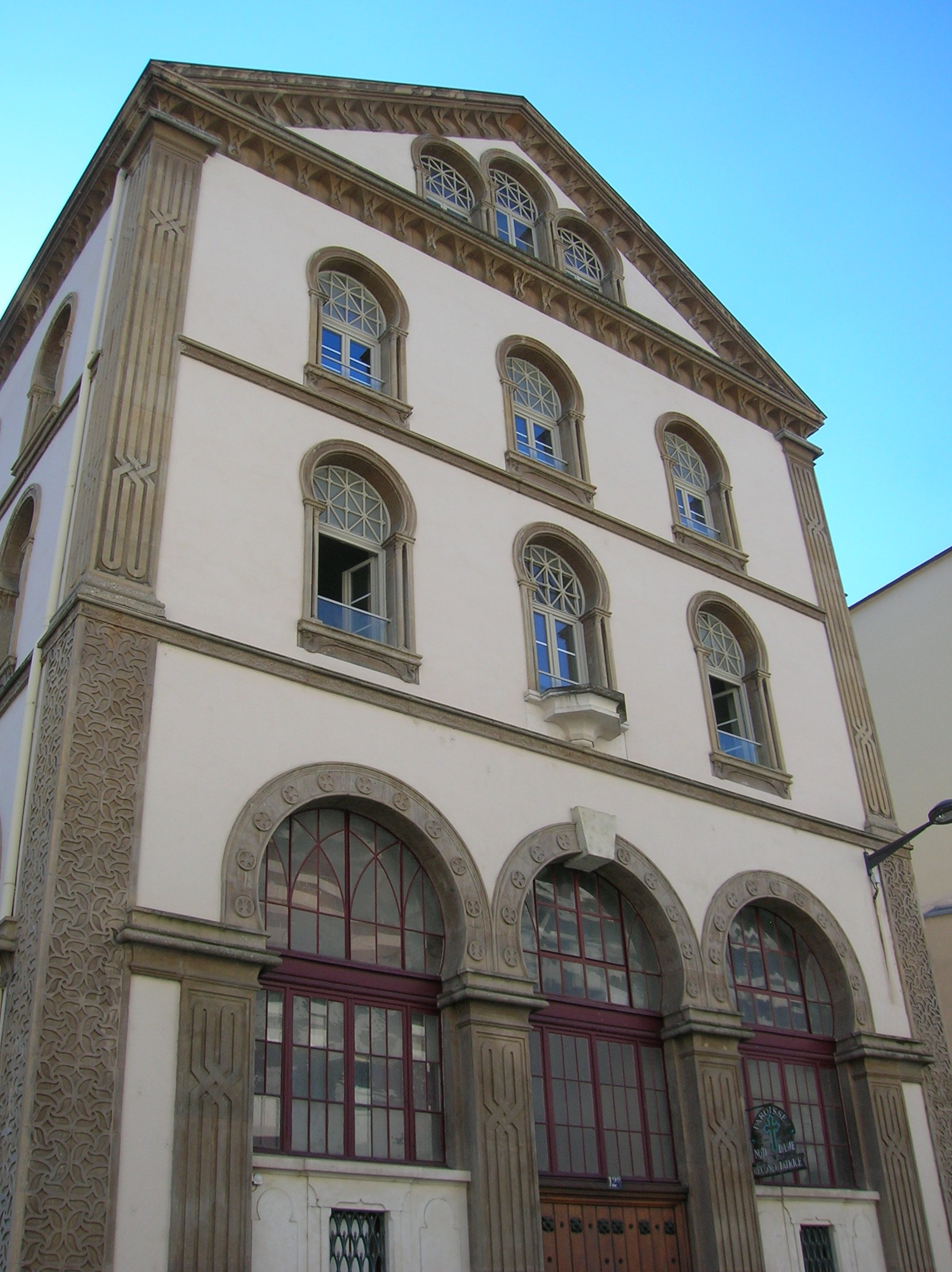 église Notre-Dame Réconciliatrice, Grenoble, France. Culte catholique romain.